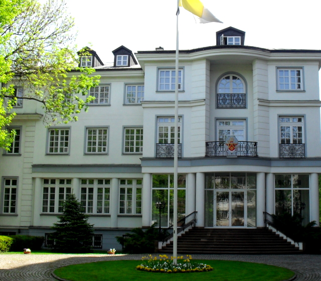 Warszawa, Nuncjatura Stolicy Apostolskiej